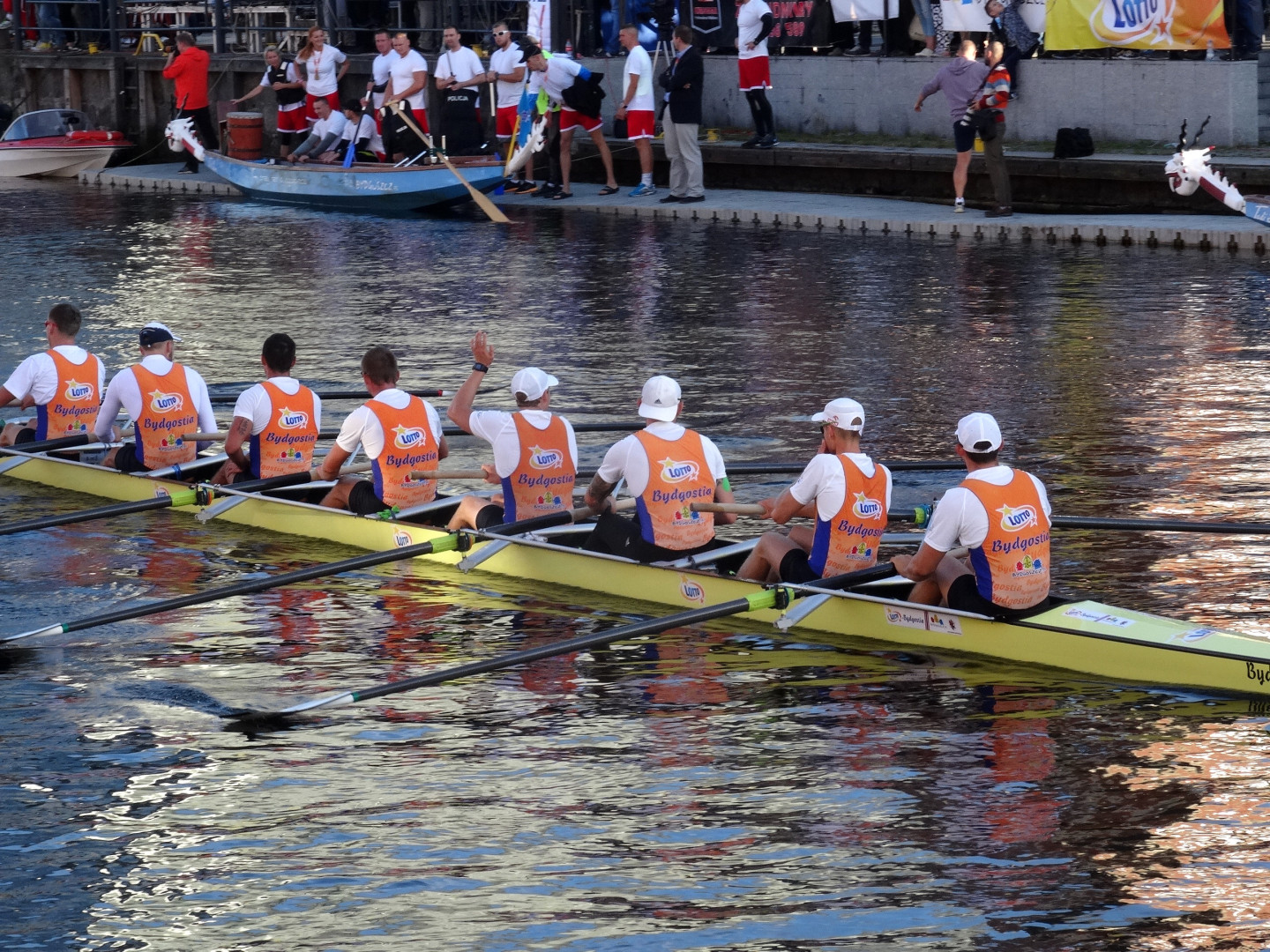 XXV Wielka Wioślarska o Puchar Brdy, 2016. Ósemka ze sternikiem Lotto Bydgostia